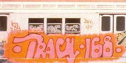 Graffiti